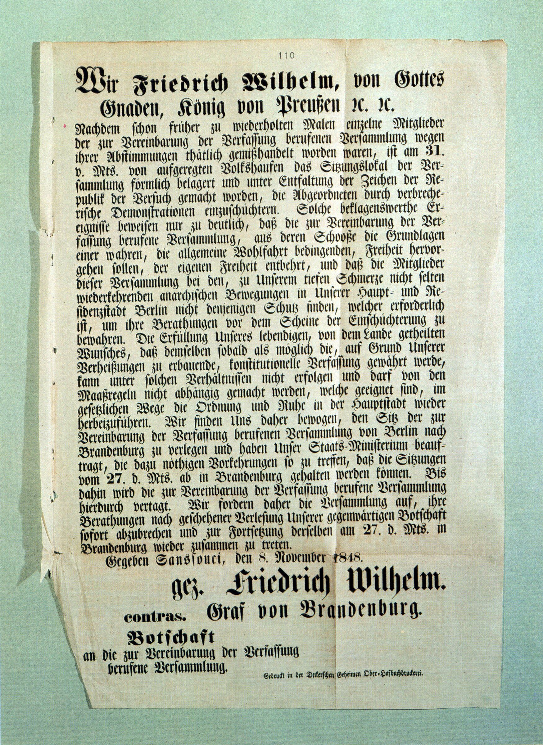 Plakatanschlag von Friedrich Wilhelm III. (Preußen) zur Verlegung der Nationalversammlung 1848 nach Brandenburg (Havel), um den Unruhen der Revolution zu entgehen. Gezeichnet in Potsdam, Schloss Sanssouci. [Korrektur: Muss Friedrich Wilhelm IV. sein.]